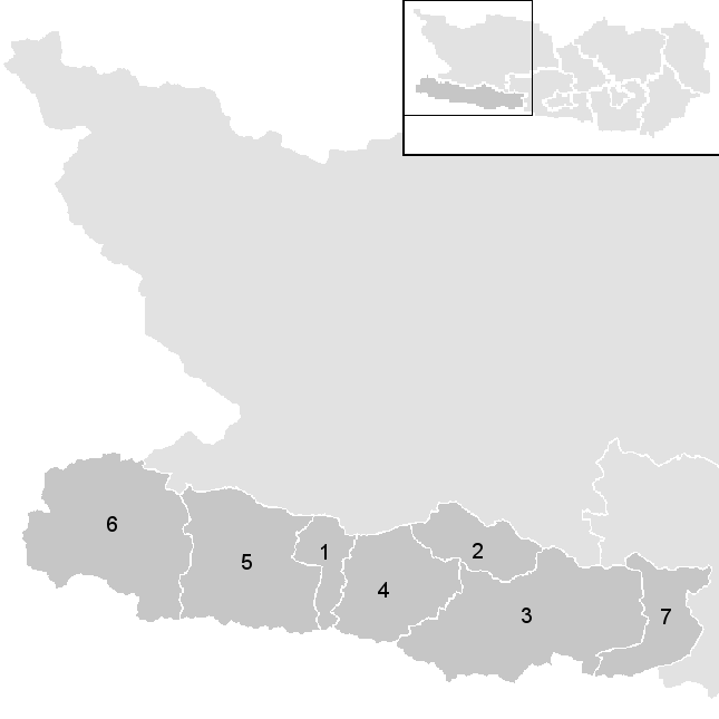 Leere Karte mit den Gemeinden im Österreichischen Bezirk Hermagor